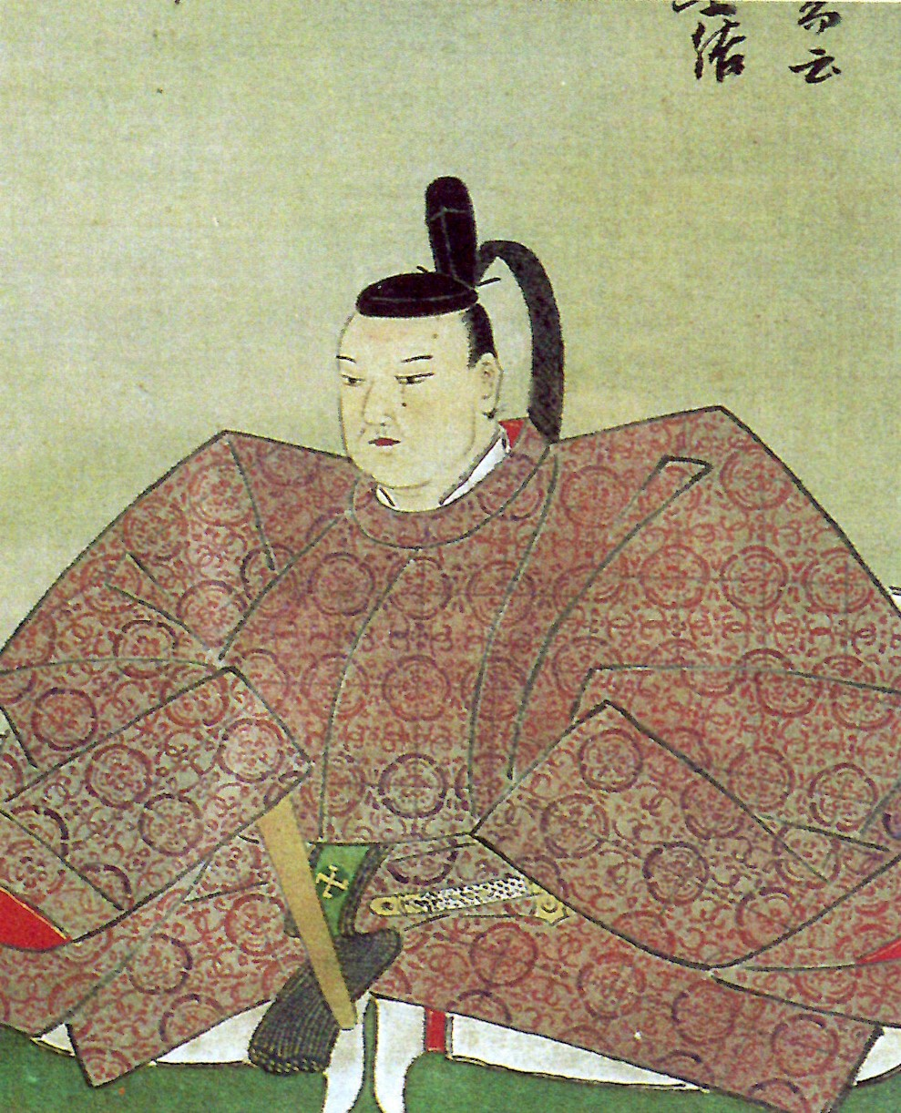 堀直輝の肖像。